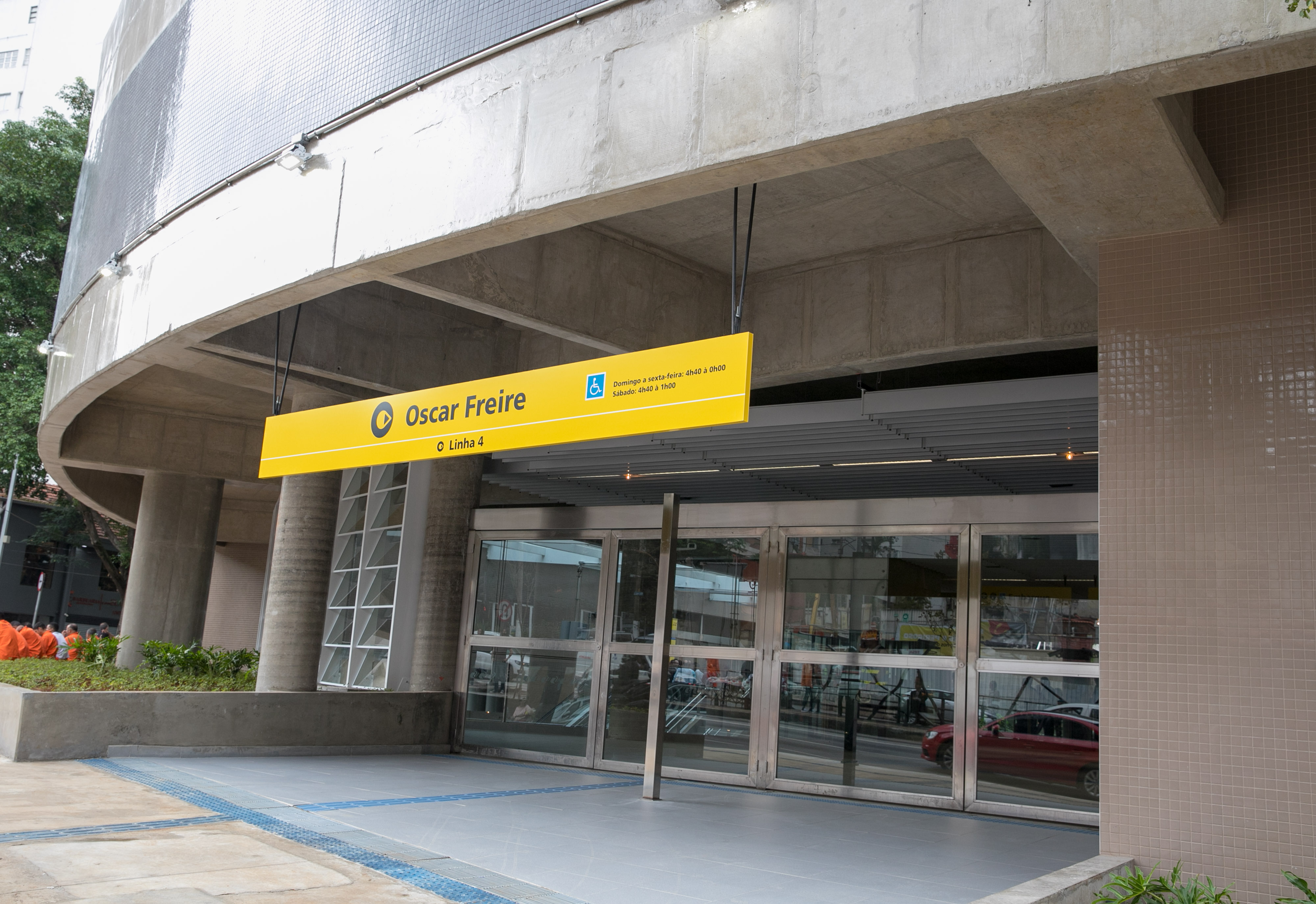 O governador do Estado de São Paulo, Geraldo Alckmin, inaugura estação Oscar Freire do metro. Local: São Paulo/ SP Data: 04/04/2018 Foto: Governo do Estado de São Paulo